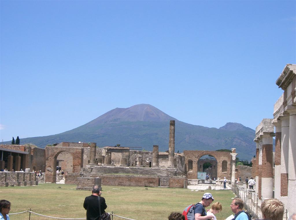 Vista del monte Vesubio desde las ruinas de Pompeya.